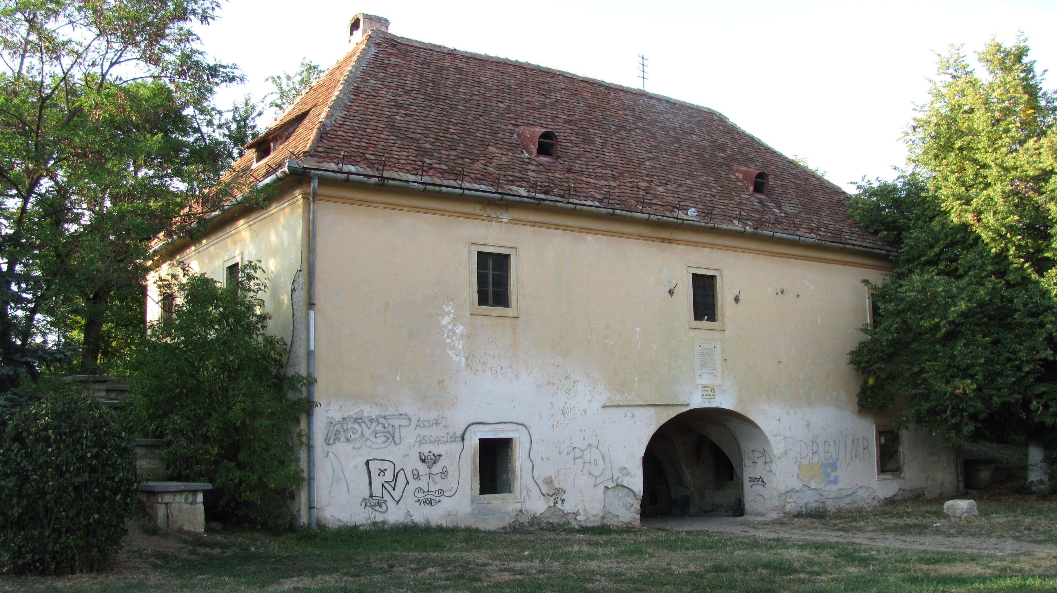 Cluj-Napoca- Cetățuia-casă și placă memorială - INSCRIPȚIE PE CLĂDIRE: "În acest loc a fost executat, la 11 mai 1849, din ordinul nobilimii contrarevoluționare maghiare, profesorul sas Stefhan Ludwig Roth, intelectual progresist, militant activ in revoluția de la 1848, susținator neobosit al drepturilor sociale si naționale ale populației săsesti și ale poporului român".